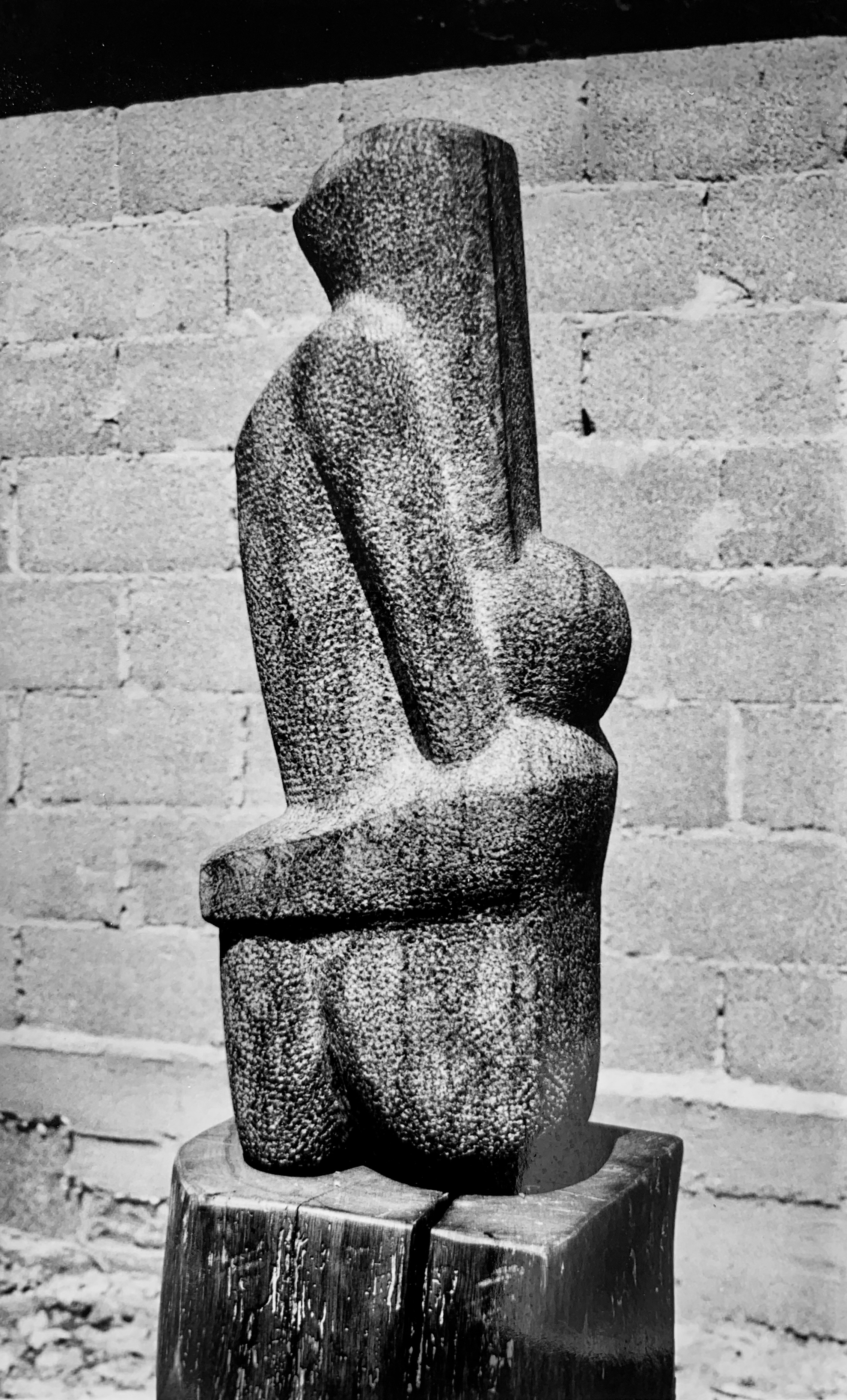 Vereinigung - Diabas, 70cm, 1960